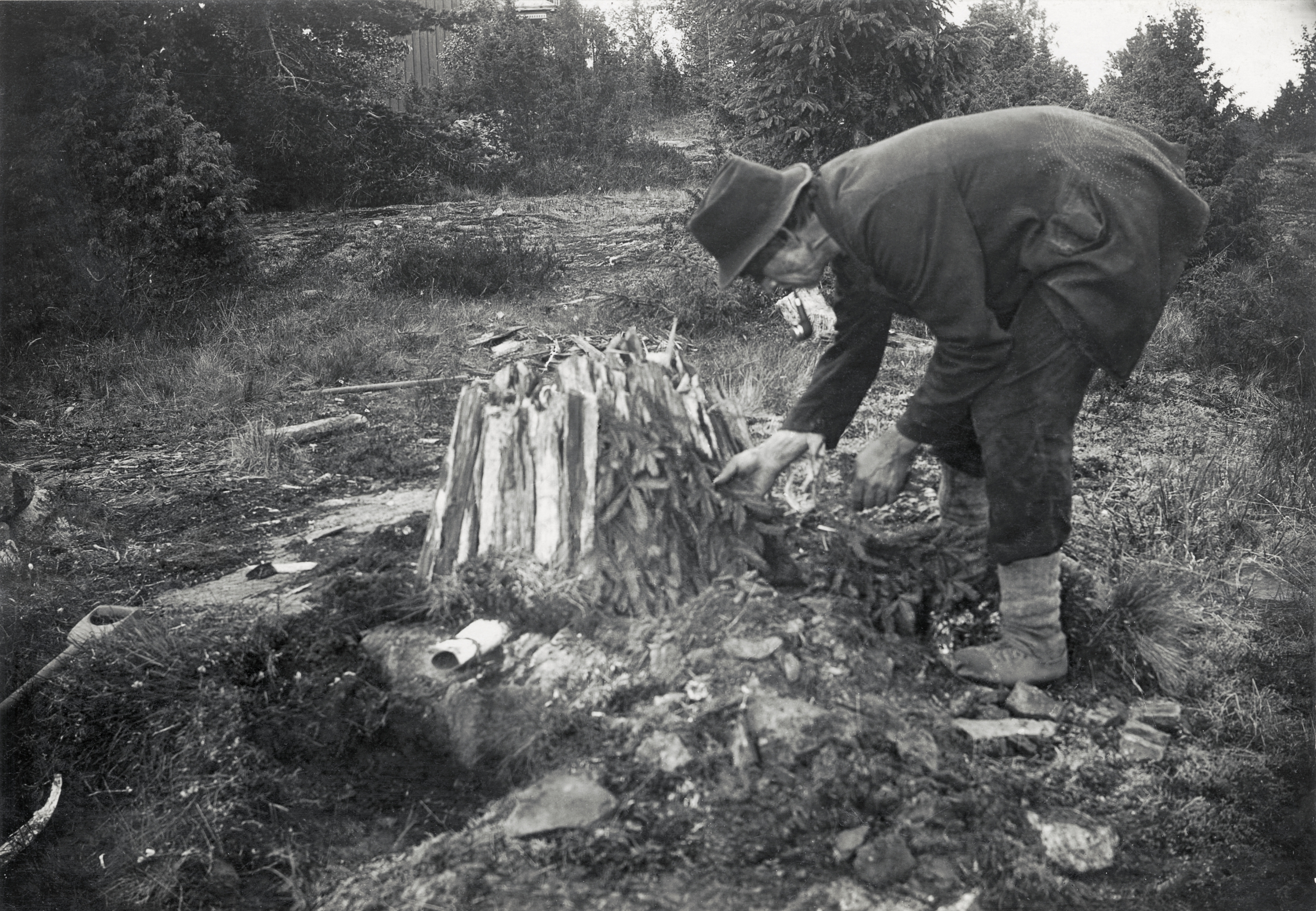 Tjärbränning. "Tjärmila täckes med granris. Över bergkanten framskjuter en näverpipa, vilken utgör avloppet för tjäran"